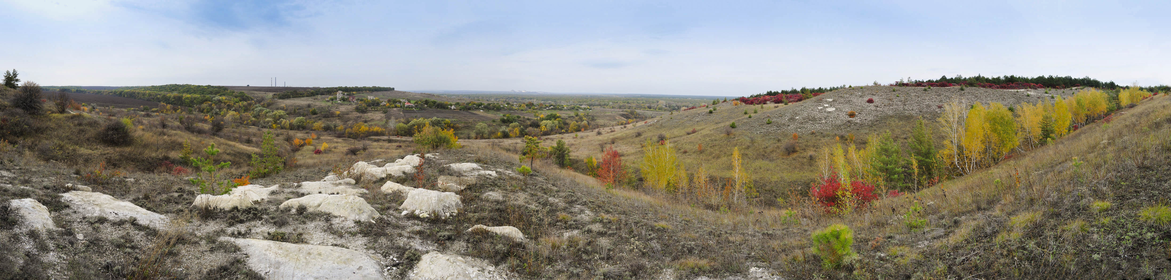 Крейдяне, Слов'янський р-н, біля с. Піскунівка та Стародубівка